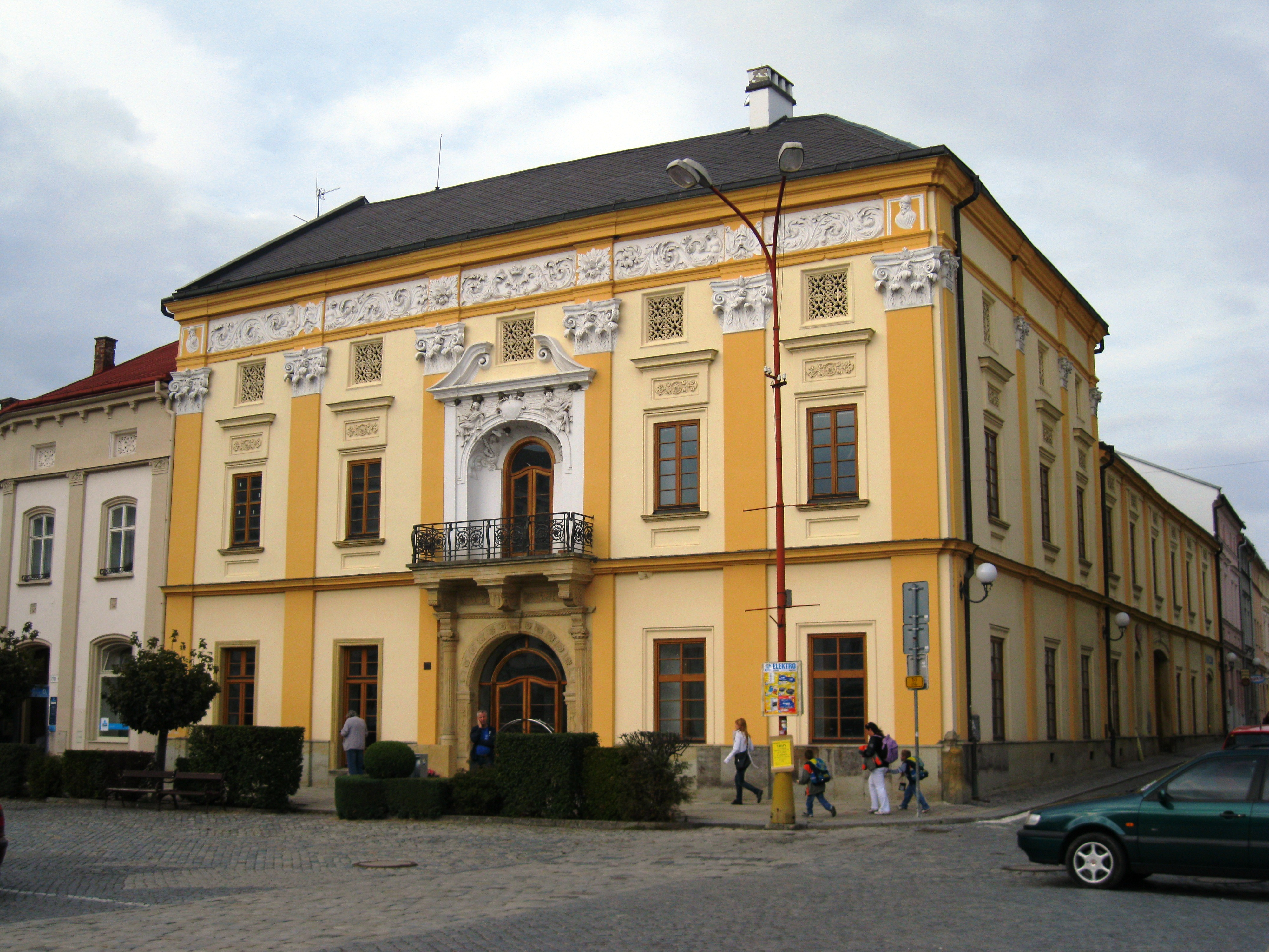 Měšťanský dům (Litovel), nám. Přemysla Otakara čp. 769, Litovel